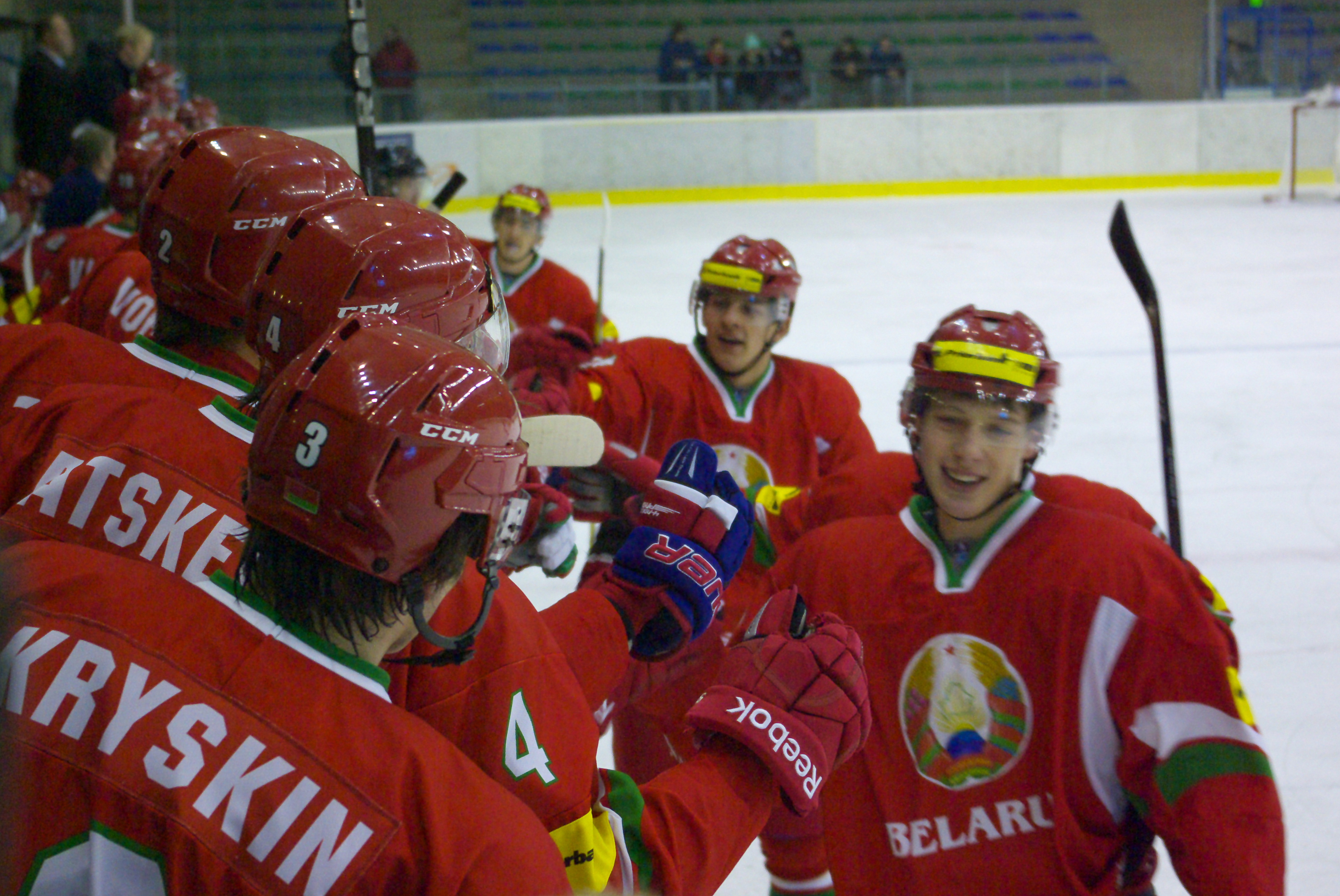 Drużyna Białorusi po zdobyciu gola podczas Mistrzostw Świata Juniorów w Hokeju na Lodzie 2014 I Dywizji w Sanoku, Białoruś - Dania 4:5, Arena Sanok 18 grudnia 2013